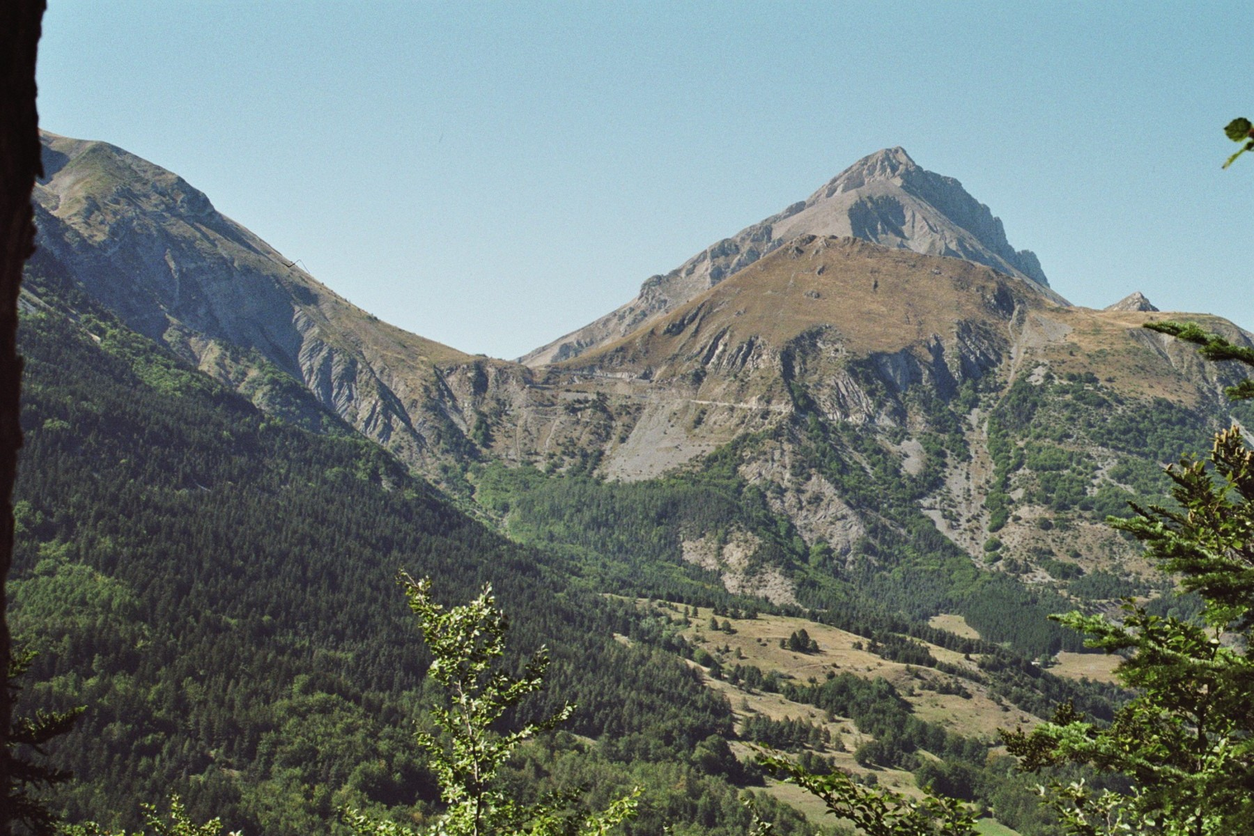 Le col du Noyer vu de Poligny avec le Pic Ponsin (2335m)